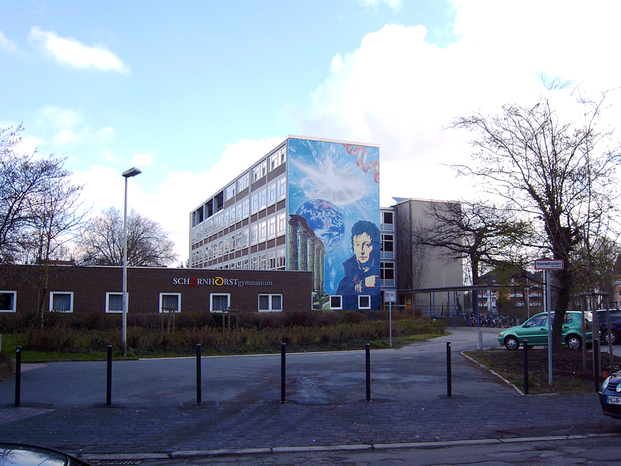 Haupteingang des Scharnhorstgymnasiums in Hildesheim